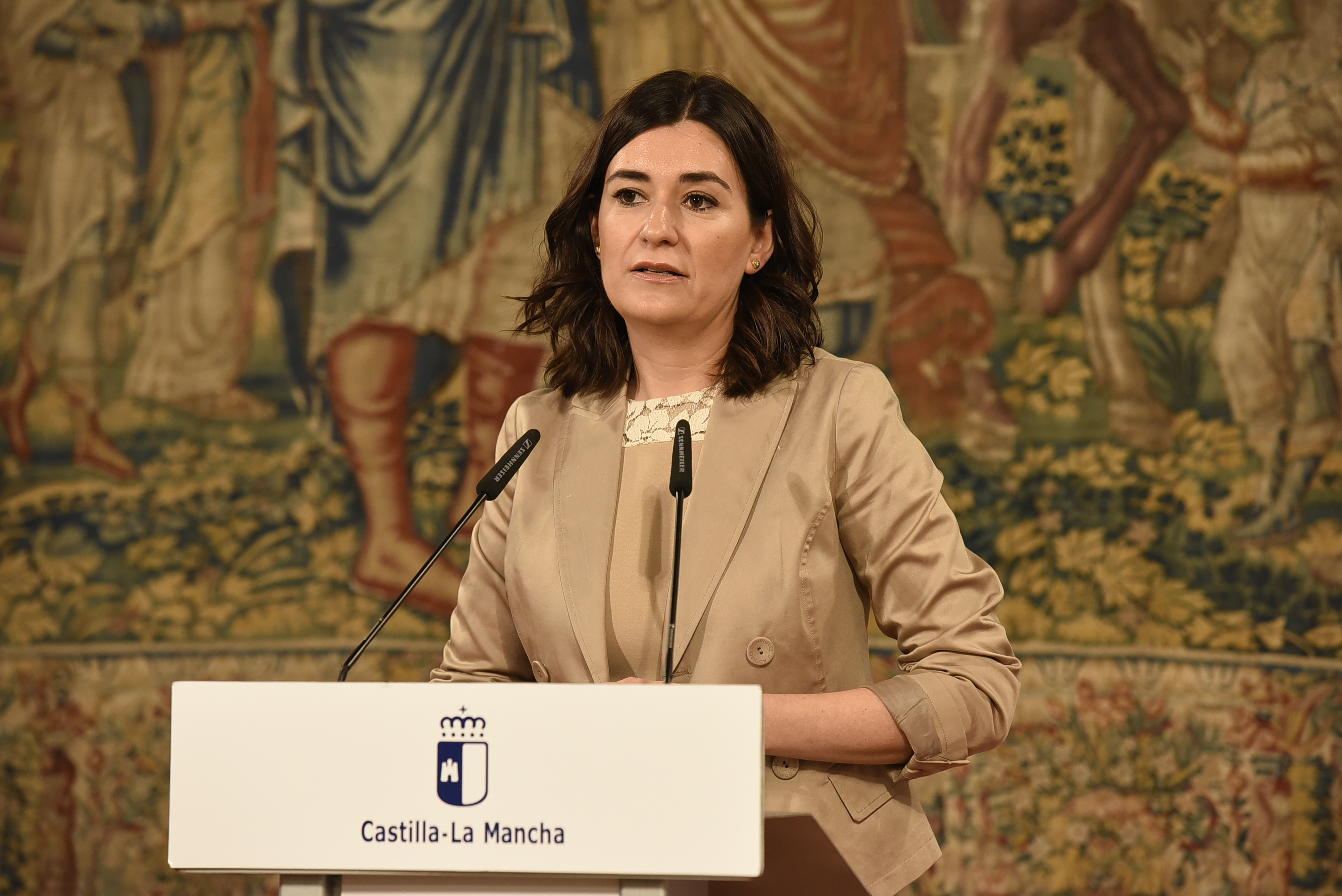 Toledo, 25 de julio de 2018.- El presidente de Castilla-La Mancha, Emiliano García-Page, se reúne con la ministra de Sanidad, Consumo y Bienestar Social, Carmen Montón. (Fotos: José Ramón Márquez // JCCM)